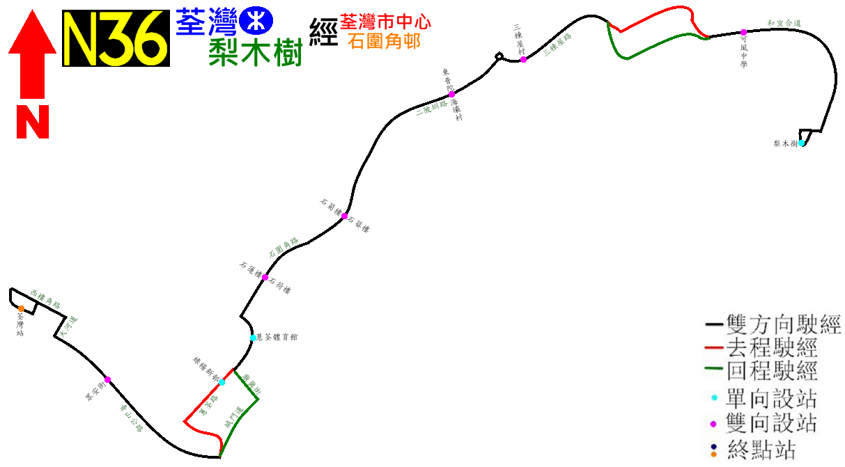 中文（香港）: 九巴通宵巴士N36線的走線圖